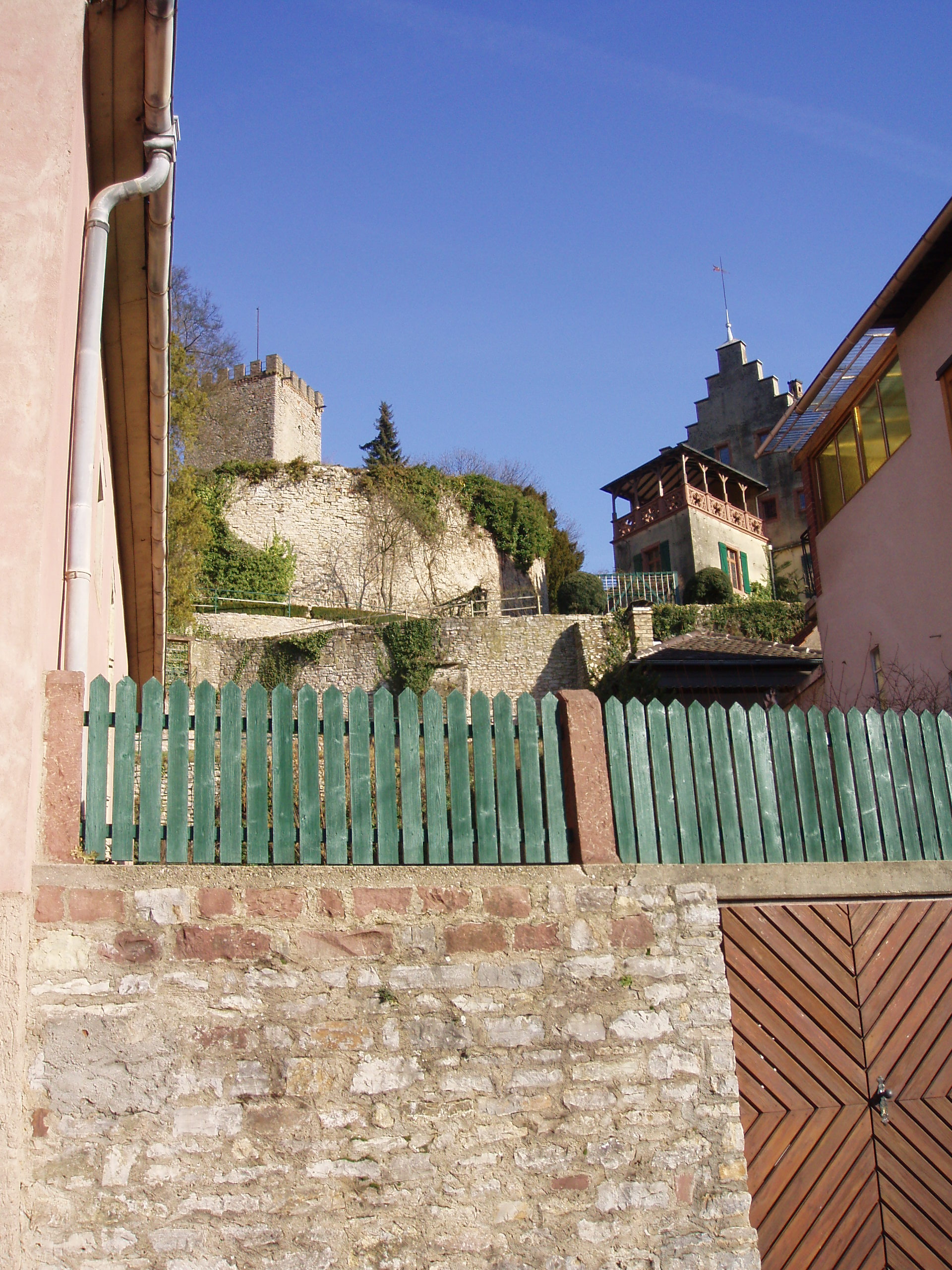 Obergrombach, Burg